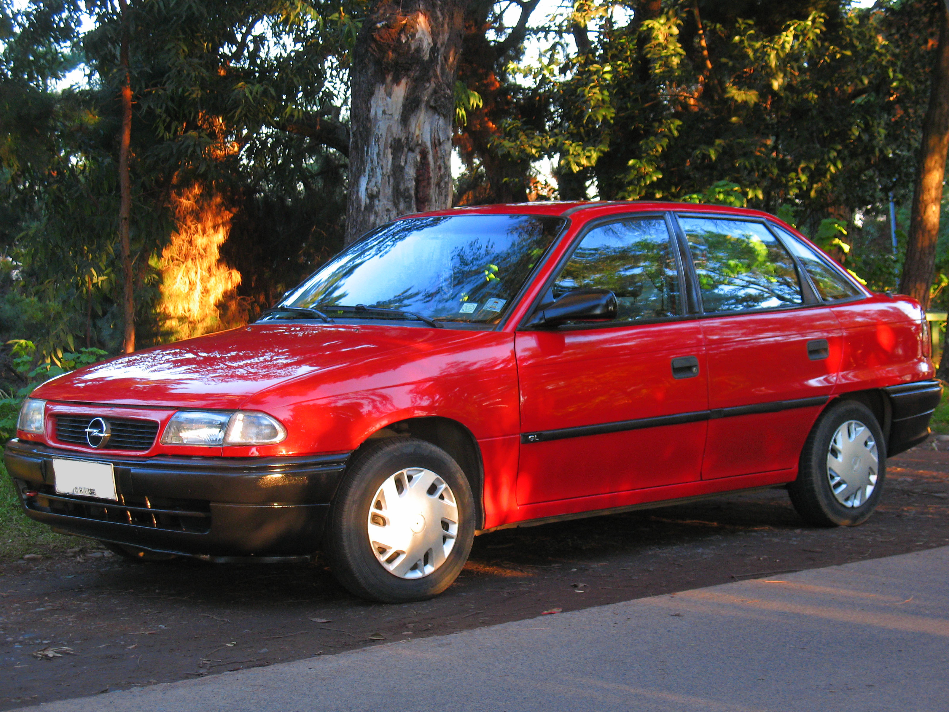 Opel Astra 1.4 GL 1995